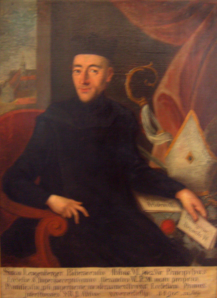 Simon Lengenberg Abt der Benediktinerreichsabtei Ochsenhausen